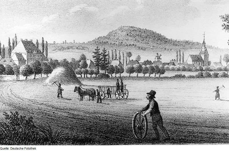 Original image description from the Deutsche Fotothek Wermsdorf-Calbitz. Ortsansicht mit Windmühlen